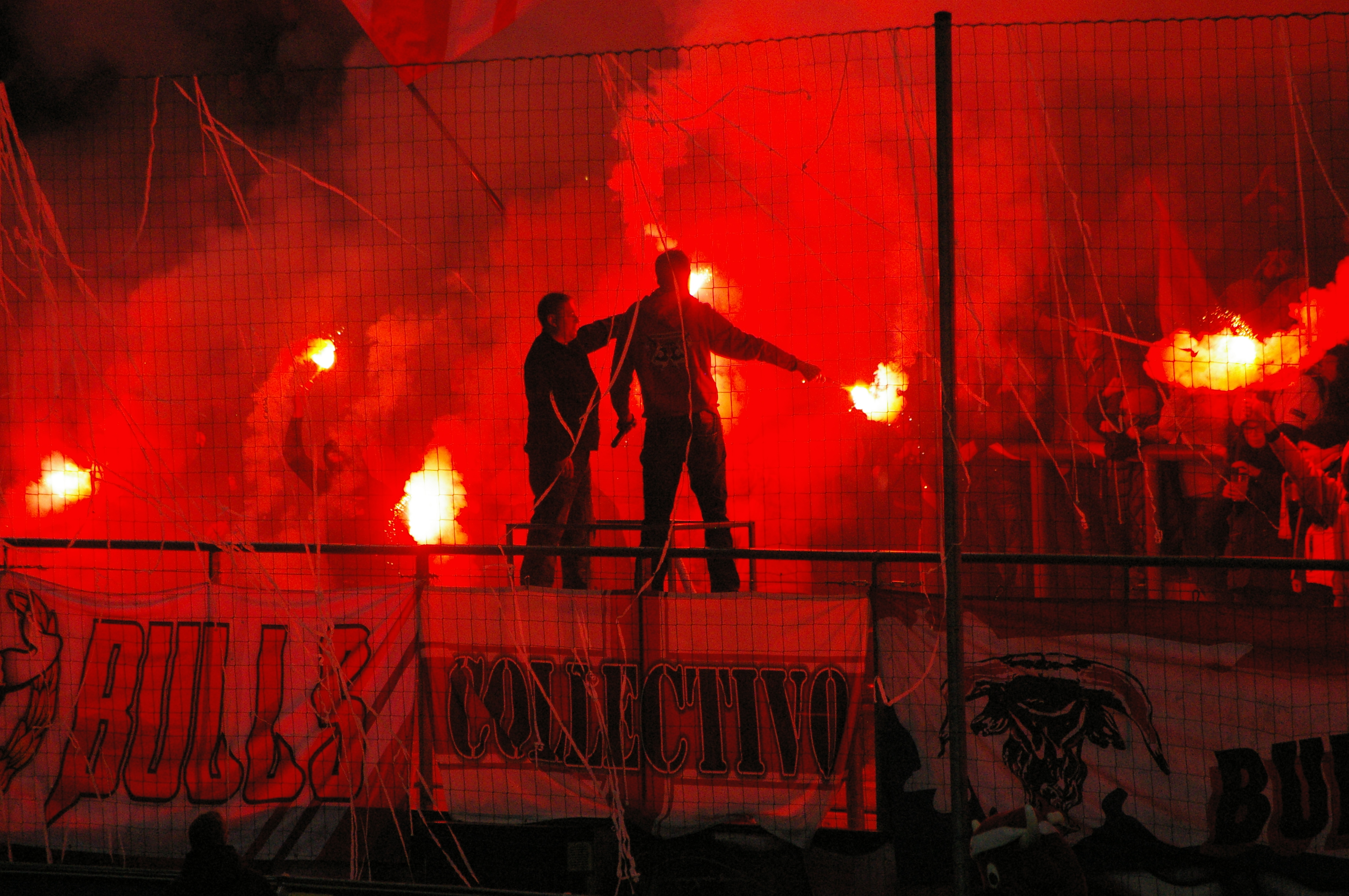 Spiel der 19. Runde Österreichische Bundesliga